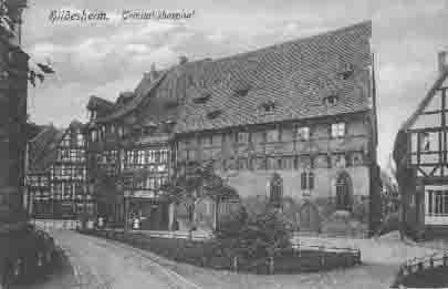 Hildesheim, Trinitatis-Hospital, erbaut 1329, zerstört 1945; Fotografie um 1900